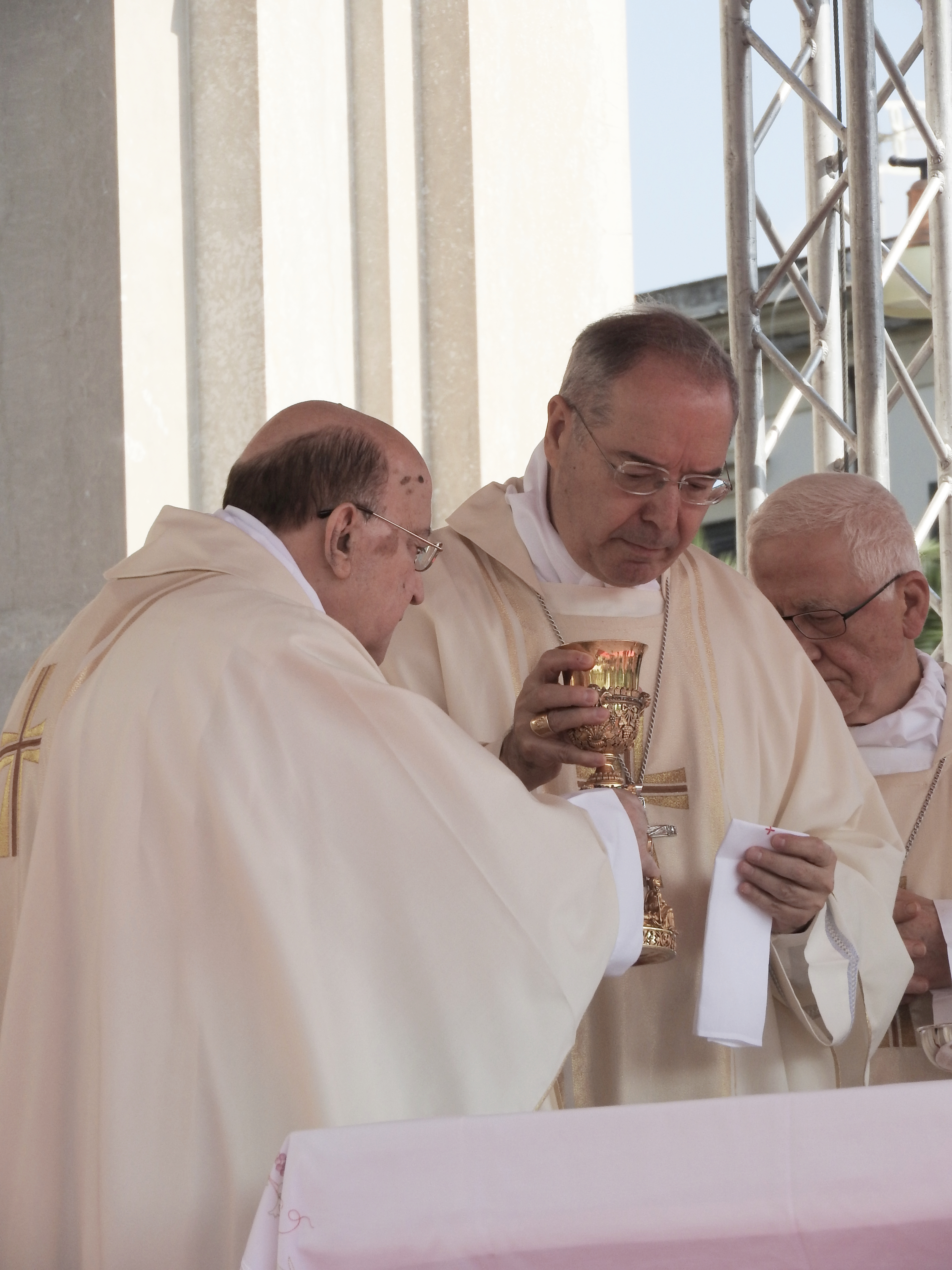 il vescovo cattolico italiano Tommaso Caputo (al centro) durante una celebrazione eucaristica